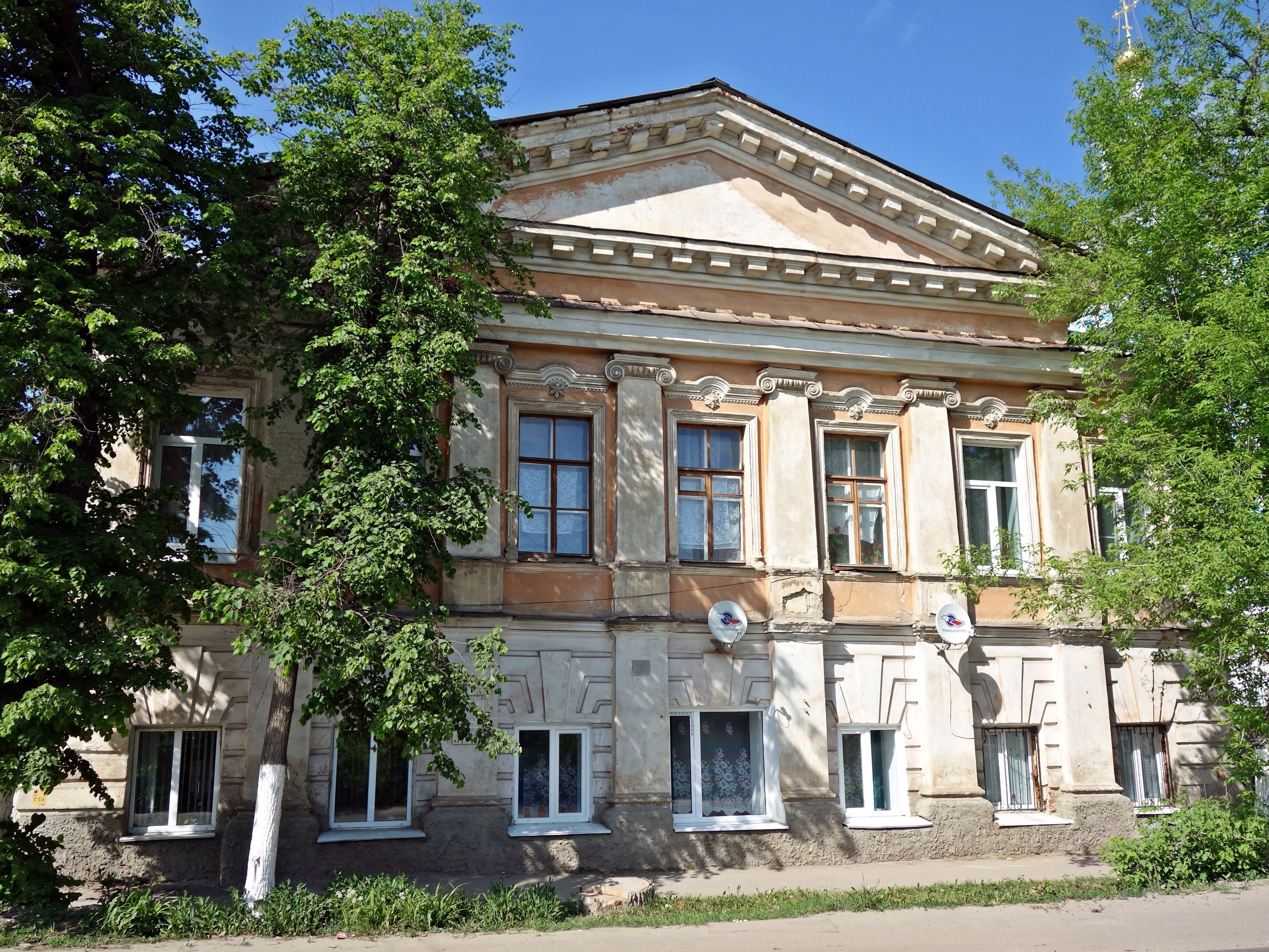 Усадьба Серебрянникова: улица Ленина, 41, Арзамас, Нижегородская область